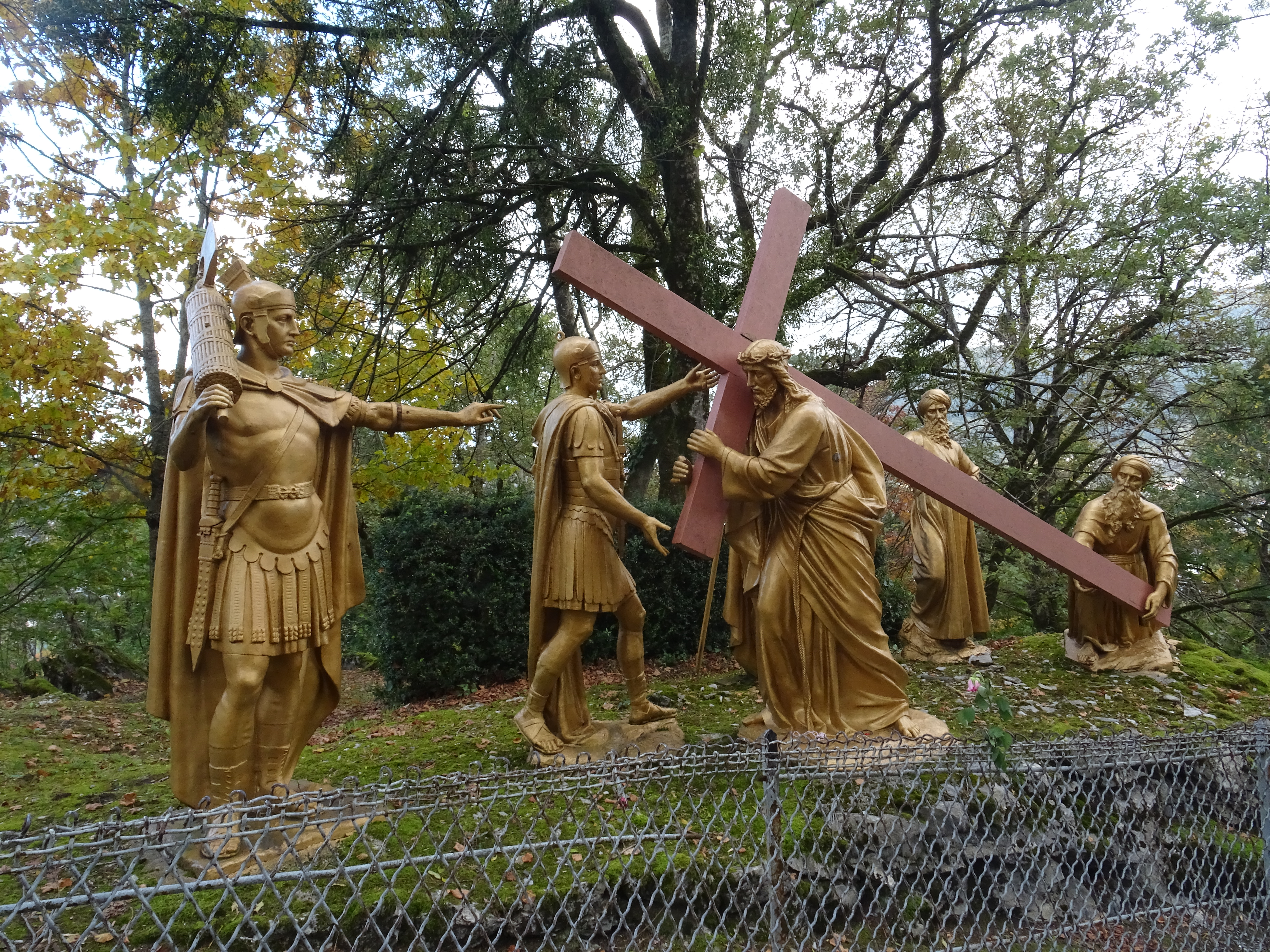 Lourdes - Chemin de Croix des Espélugues - 5e station : Simon de Cyrène aide Jésus à porter sa croix